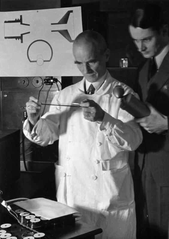 Athlet Menschenherz Professor Dr. [Arthur] Weber, der Leiter des Institutes für Herzforschung in Bad Nauheim beim Studium von Tonbildern kranker Herzen.